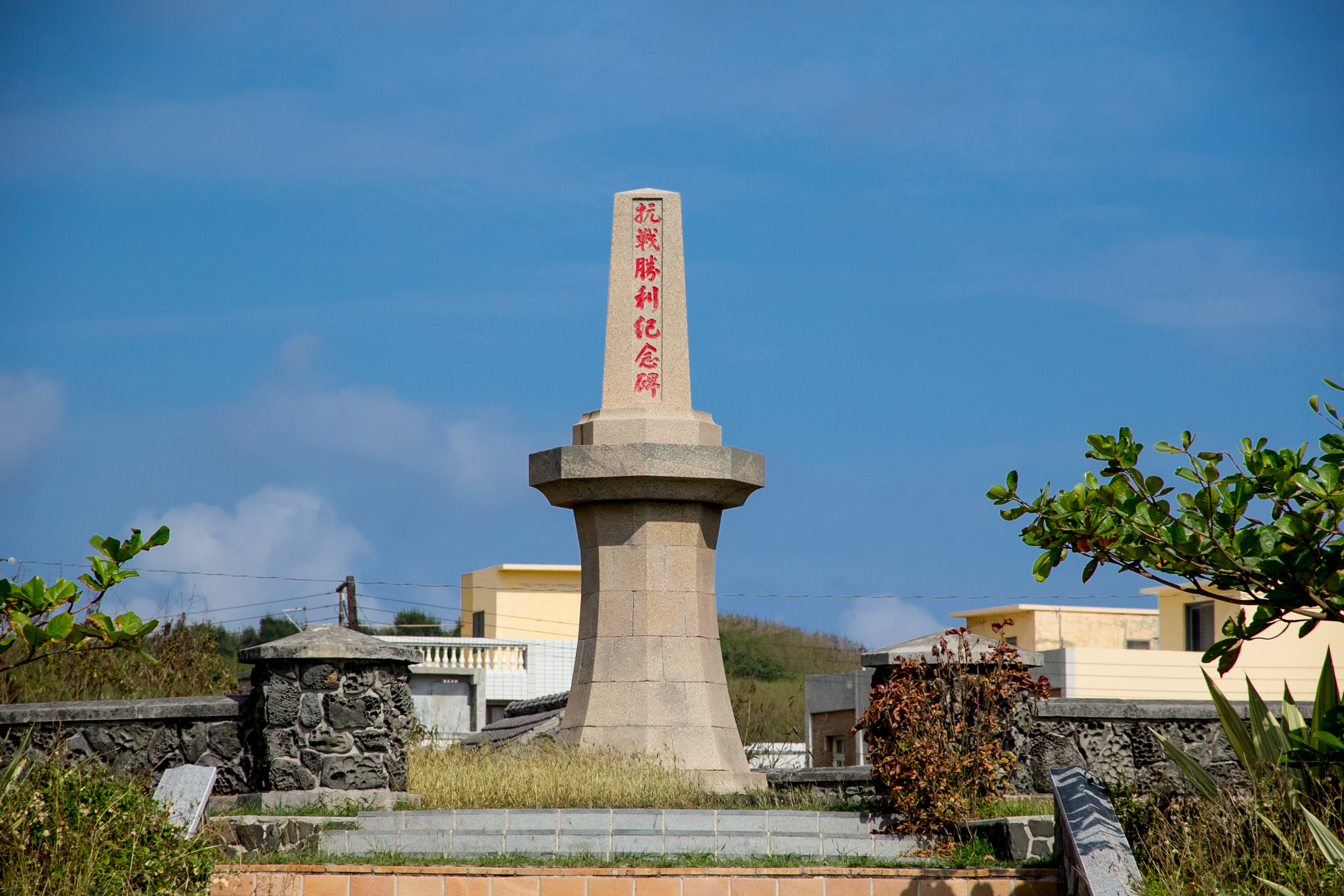 林投日軍上陸紀念碑